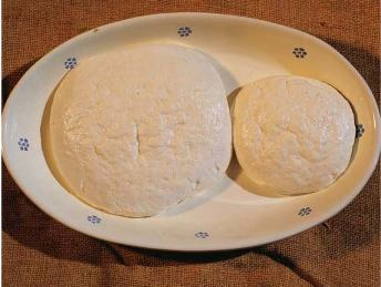 Paddraccio, formaggio della Basilicata